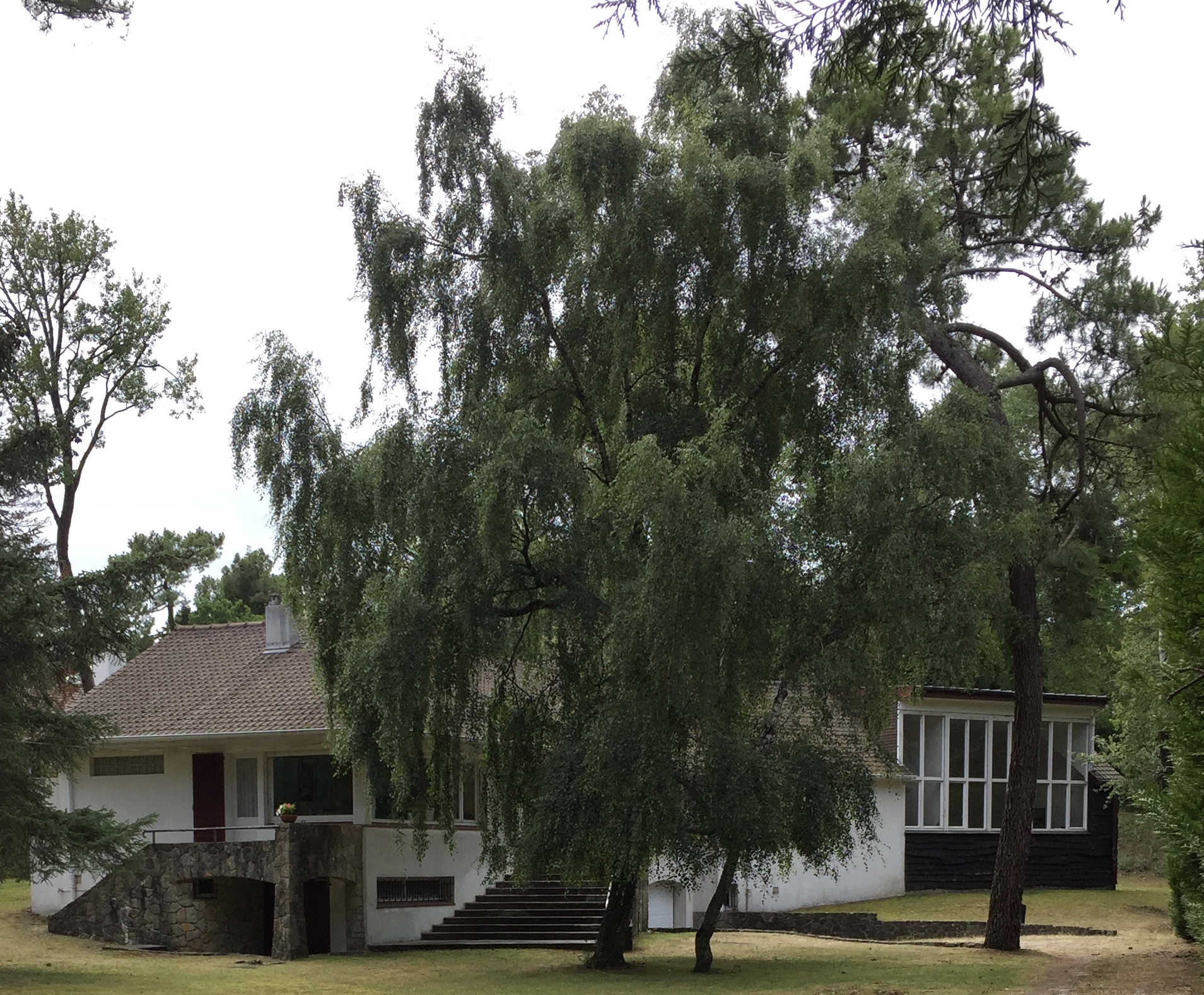 Villa-atelier "Le Mirivis" allée des Chevreuils au Touquet-Paris-Plage résidence de Jean Dubuffet (peintre)